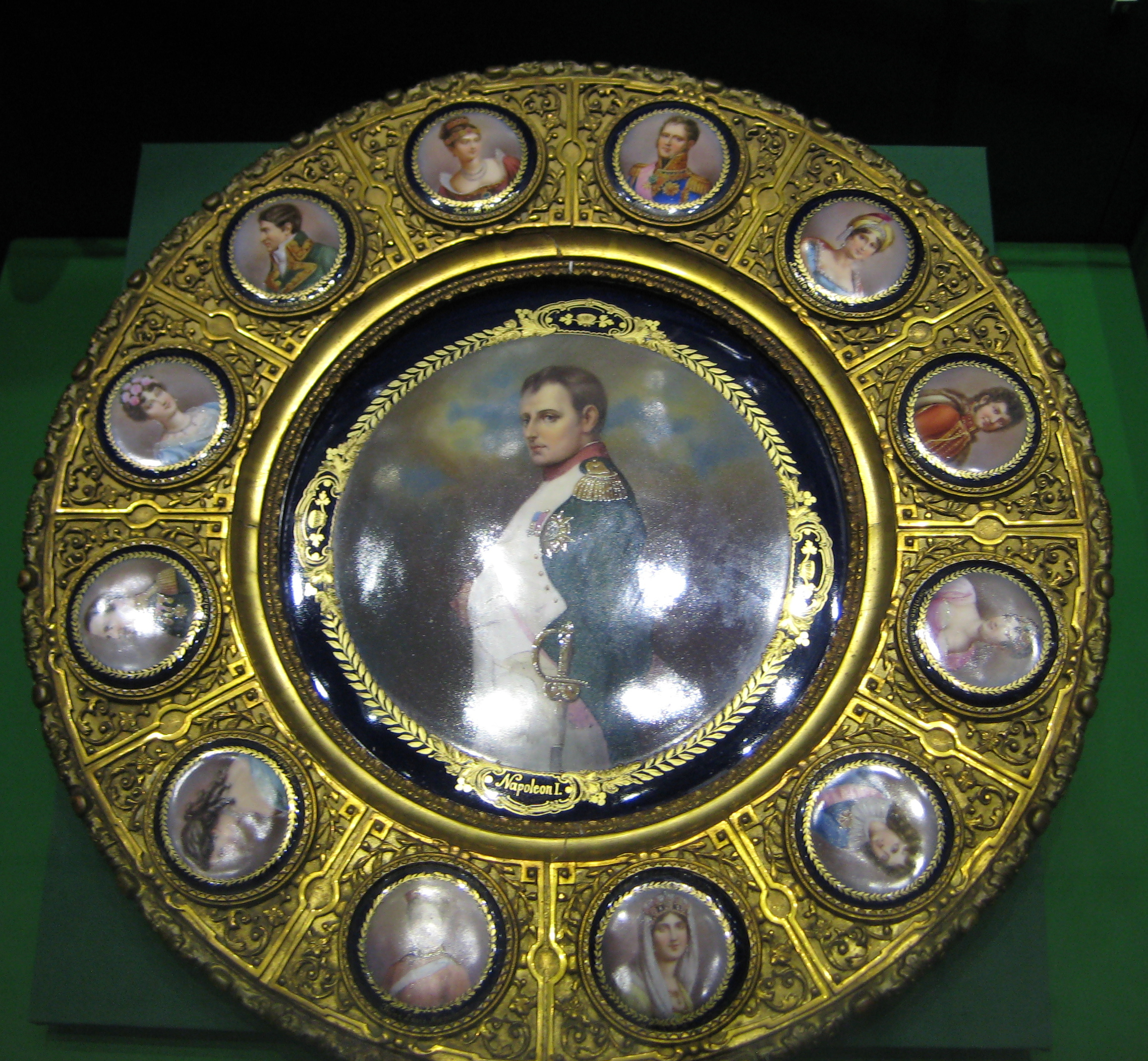 Столешница с изображением Наполеона и его родственников. Франция, Бавария, фирма Hohenberg (фарфоровая пластина и медальоны). Конеч 19 - начало 20 века. Дерево, бронза, эмаль, фарфор, резьба, надглазурная роспись, золочение. Музей "Бородинская панорама"